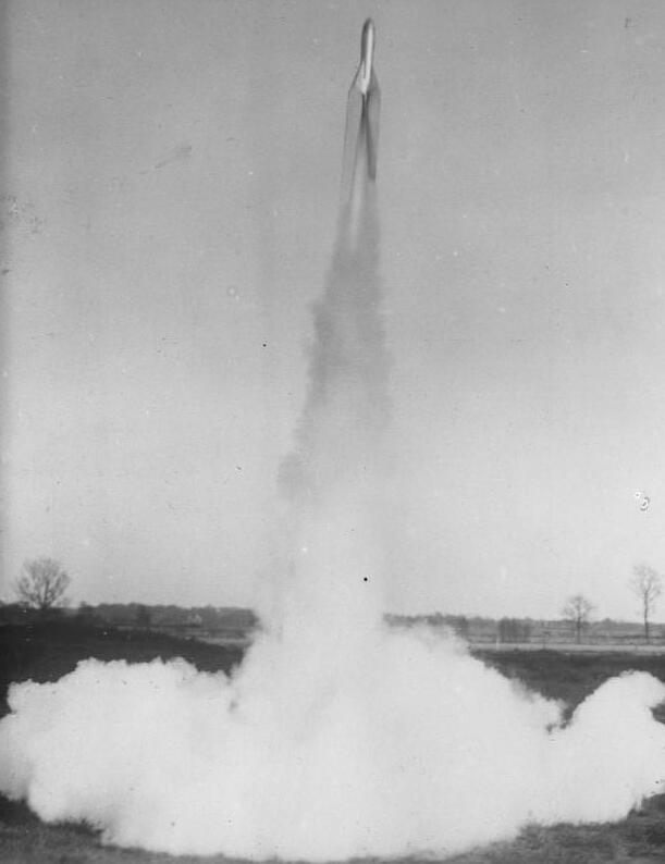 Der erste deutsche Post-Raketenflug! Am Dümmersee bei Osnabrück fand dieser Tage der erste wohlgelungene Versuch mittels Raketen Post zu befördern, statt. Start der von dem deutschen Ing. Reinhold Tilling construierten Flug-Rakete am Dümmersee bei Osnabrück.